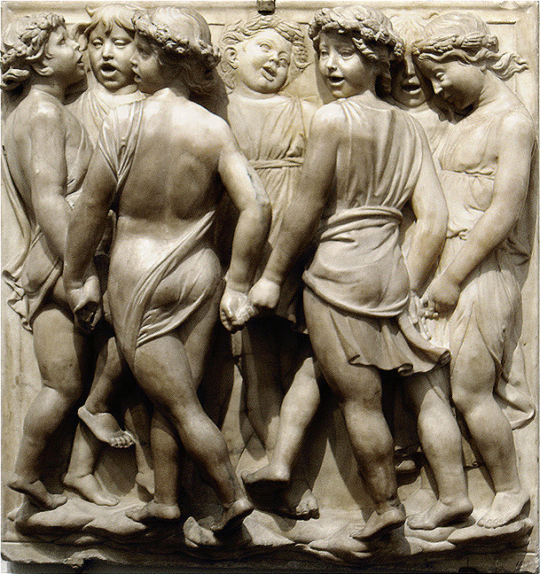 Relevo de Luca della Robbia no Museo dell'Opera del Duomo, Florença.